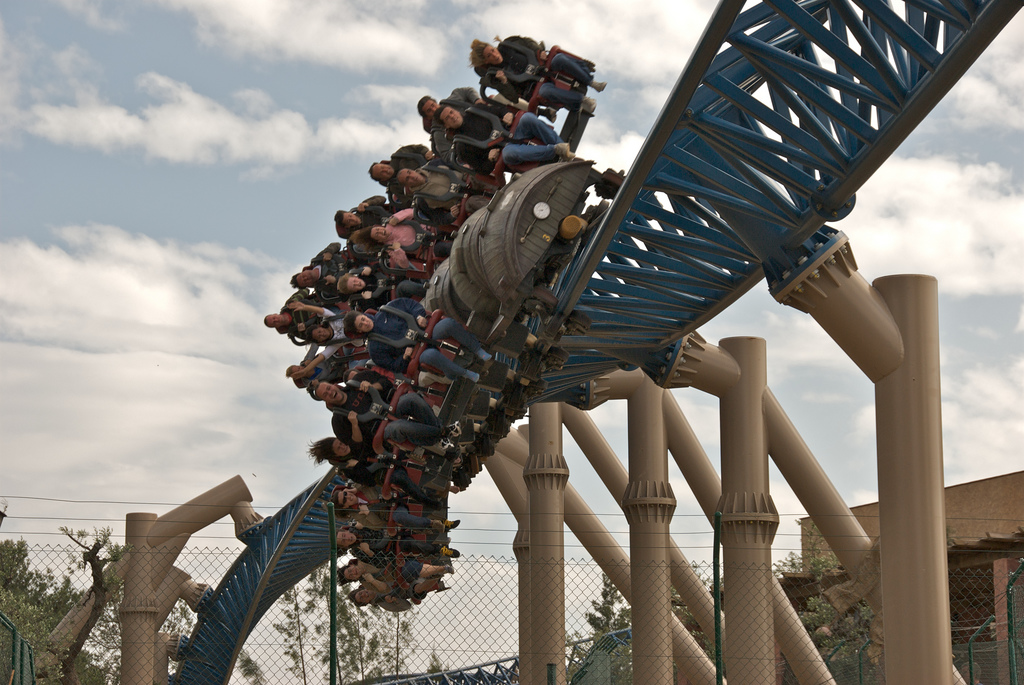 Port Adventura, Salou, Spain